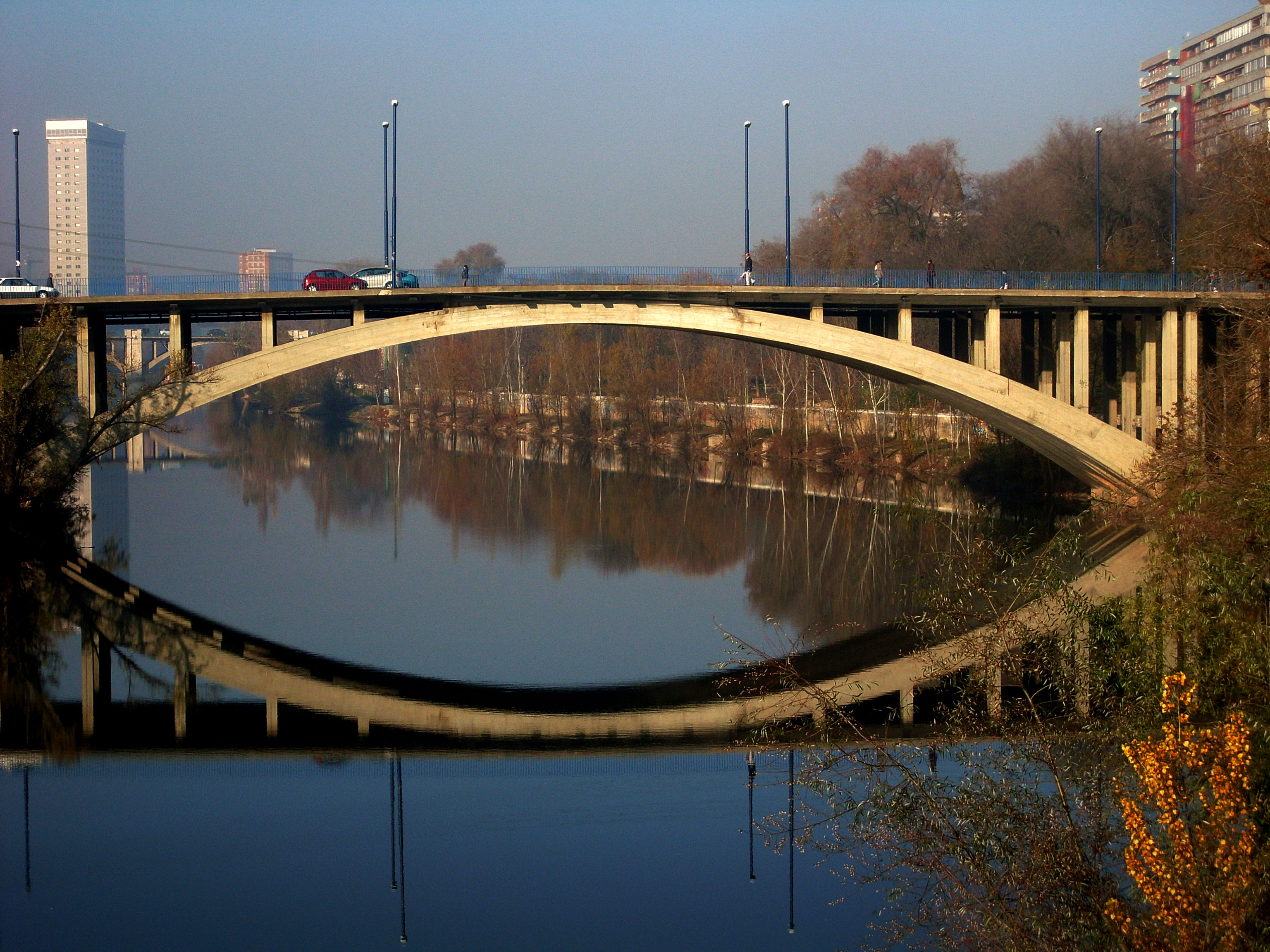 El puente del Cubo sobre el río Pisuerga en Valladolid.